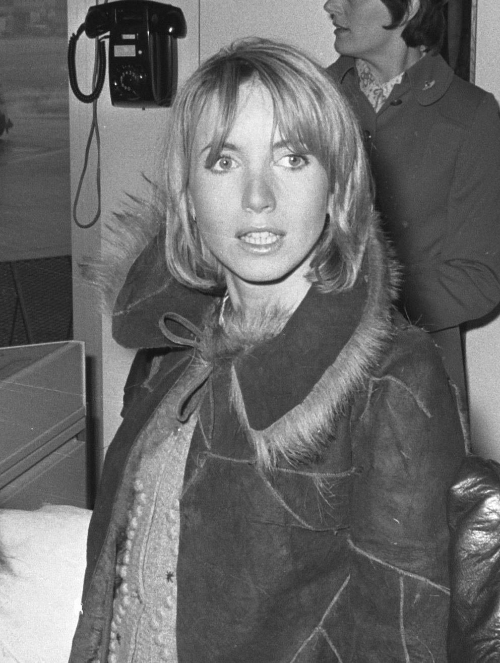 French actress Bulle Ogier, 1972.